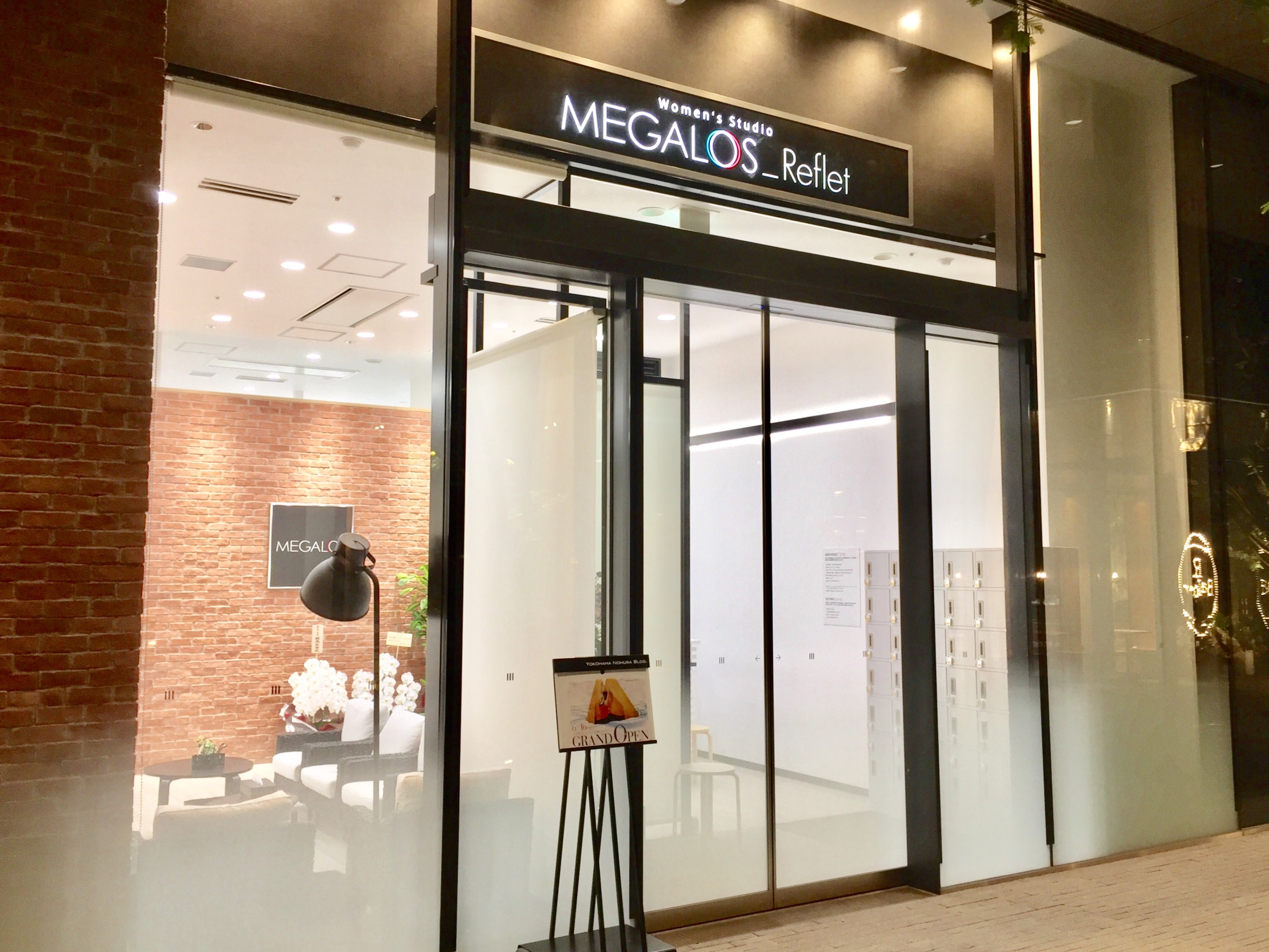 横浜野村ビルの北西〜北東側建物低層部（みなとみらい大通り側地上1階部）にて、2017年6月にオープンした女性専用フィットネス「メガロスルフレ みなとみらい」。